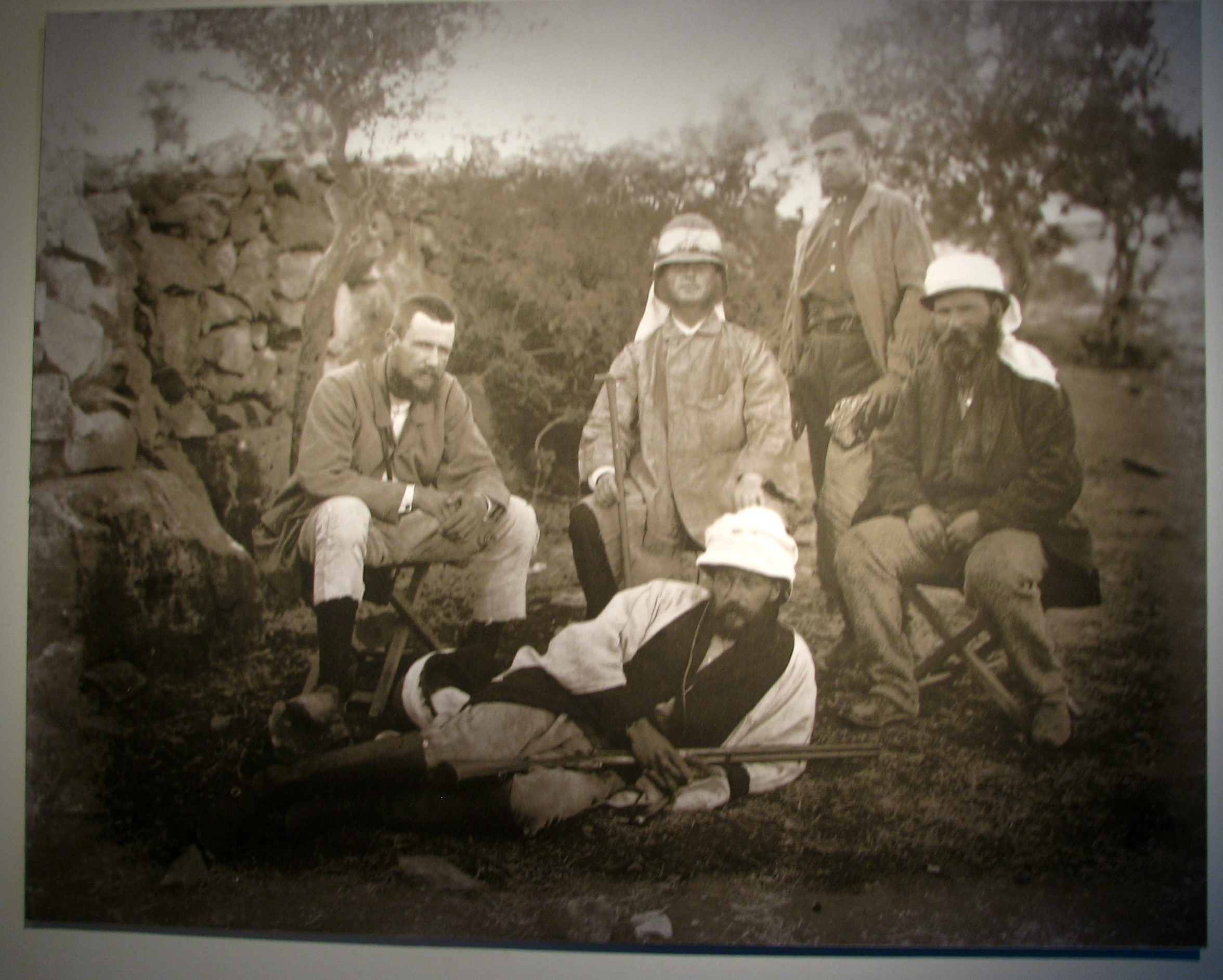 Palestine Exploration Fund, The Survey of Western Palestine equipment ציוד ששימש את עורכי סקר ארץ ישראל המערבית מטעם הקרן לחקר ארץ ישראל שנעשה בשנות השבעים של המאה התשעה עשרה הציוד מוצג במוזיון ישראל. נמסר על ידי הקרן שמושבה בלונדון צ'רלס וורן וחבורתו בסקר בירושלים